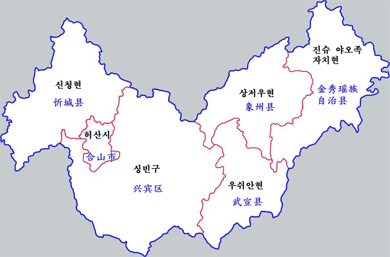 라이빈시 현급행정구역